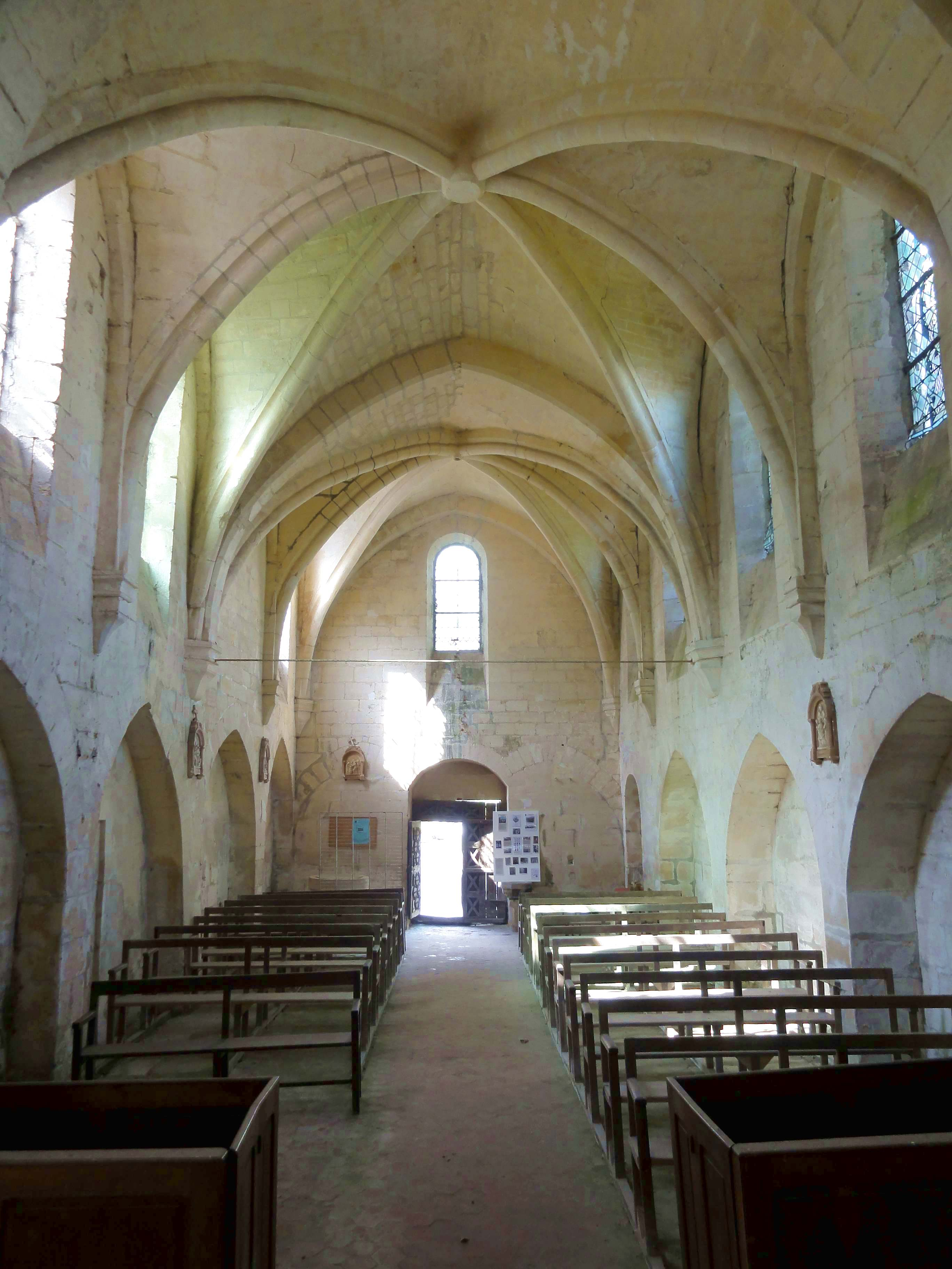 Intérieur de l'église - voir titre.